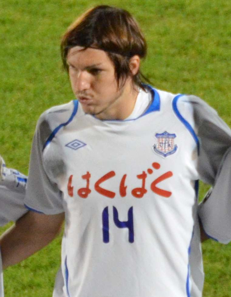 Mike Havenaar - 2010 cropped from DSC_1758